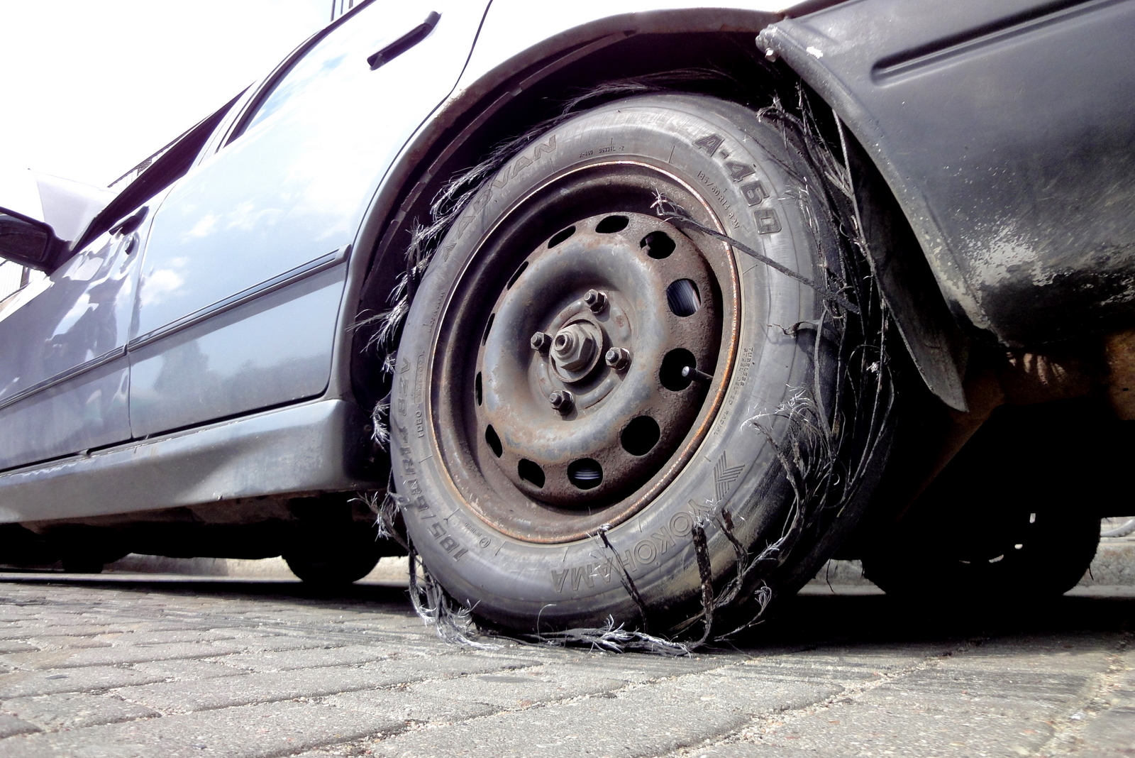 Wygląd opony po jeździe